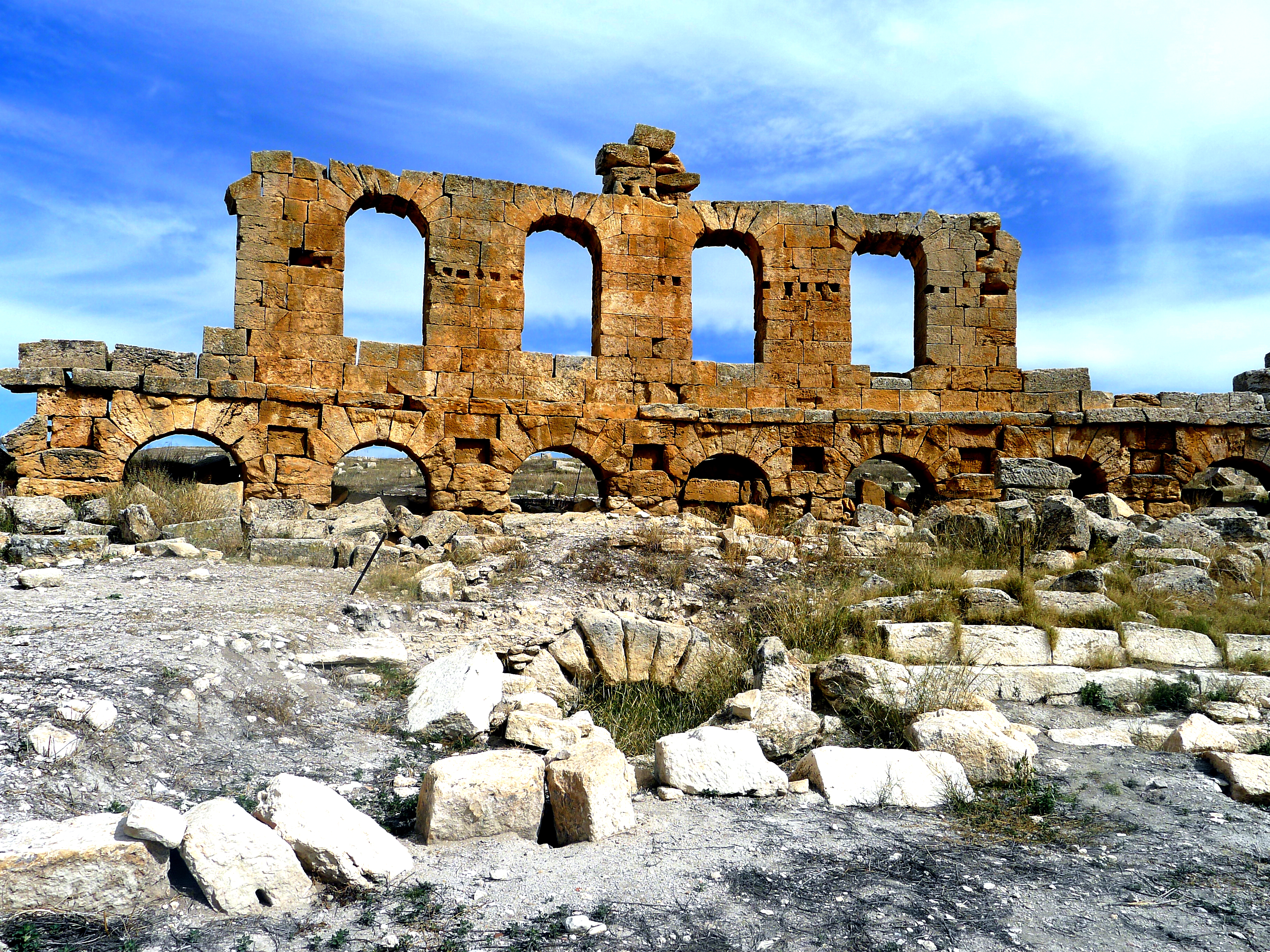 Amphithéâtre archéologique : Vers le sud s’élève le théâtre de la ville. Aujourd’hui, deux parties discontinues du mur extérieur sont en place. Il n’apparaît du rez-de-chaussée que la fin des arcades tout le reste est enfoui. Les spectateurs accédaient aux gradins à travers une galerie souterraine.